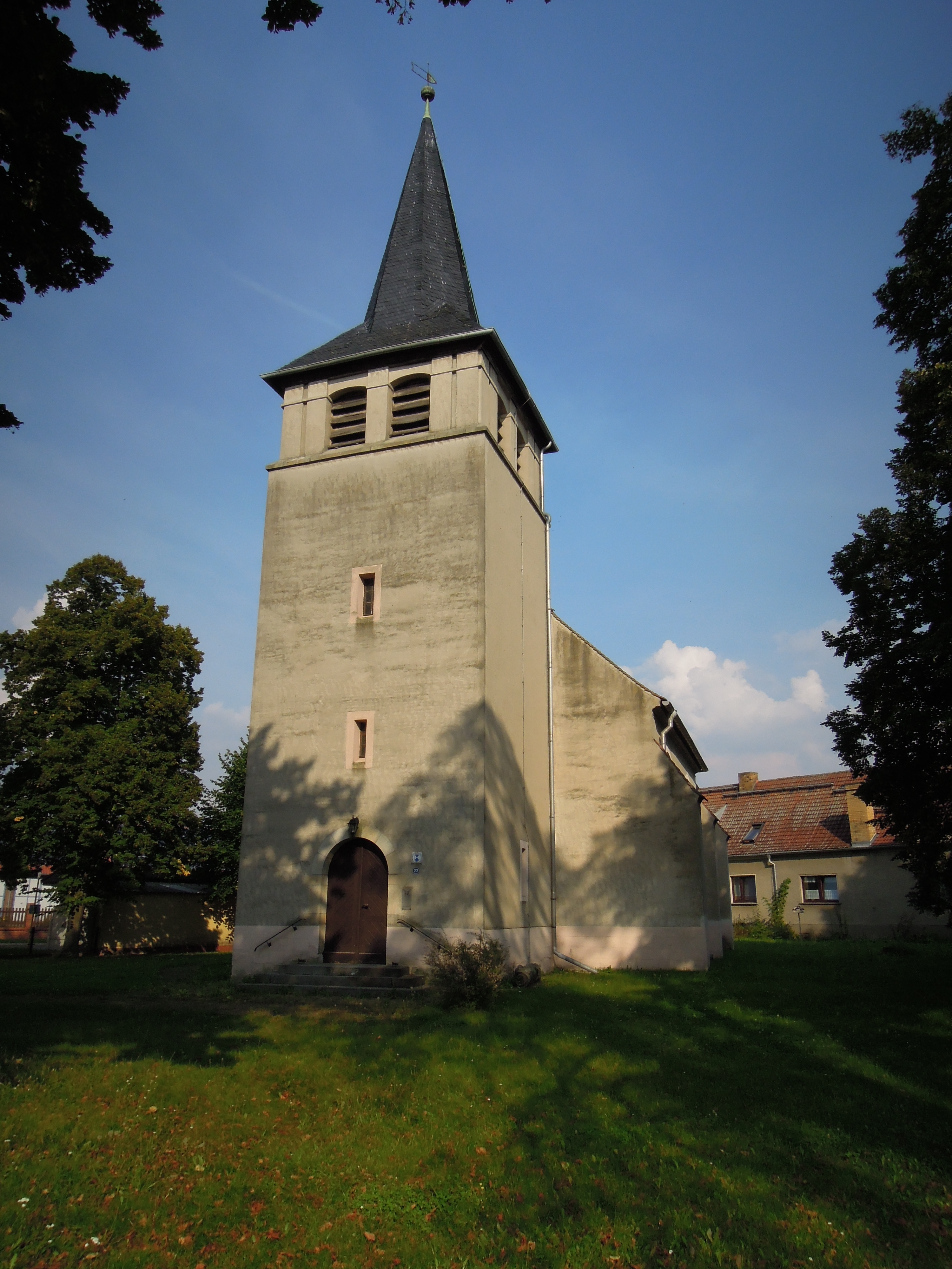 Kirche in Gorsdorf von Westen im September 2014